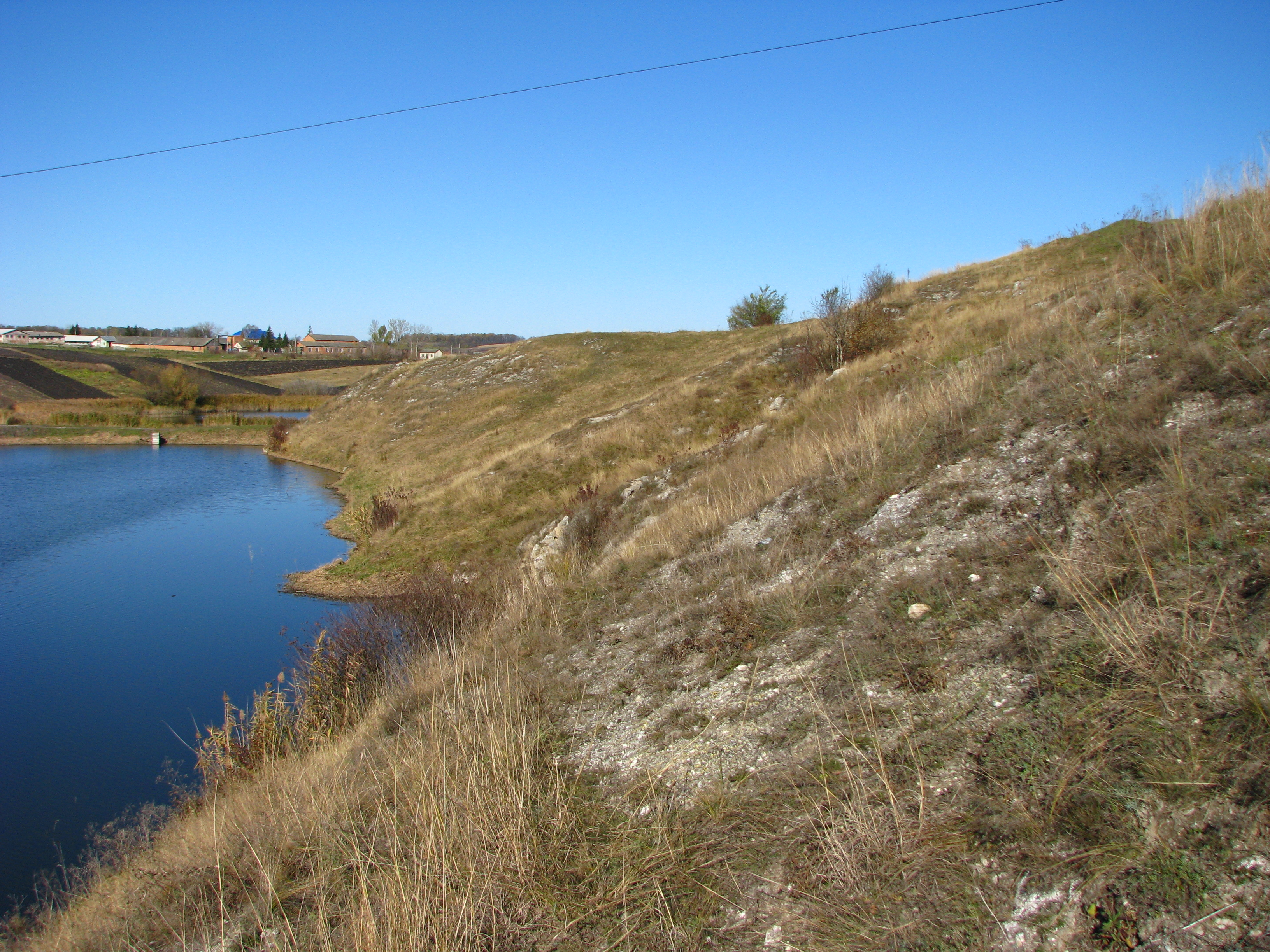 Чорнопотоцький, Заставнівський район, між селами Погорилівка і Юрківці: Погорилівська сільська рада — 19,2 га; Юрковецька сільська рада — 5,2 га; Боянчуцька сільська рада — 24,6 га.